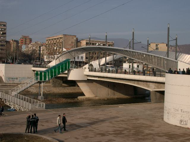 Le pont Ouest de Mitrovica (mars 2004), symbole de la division de la ville